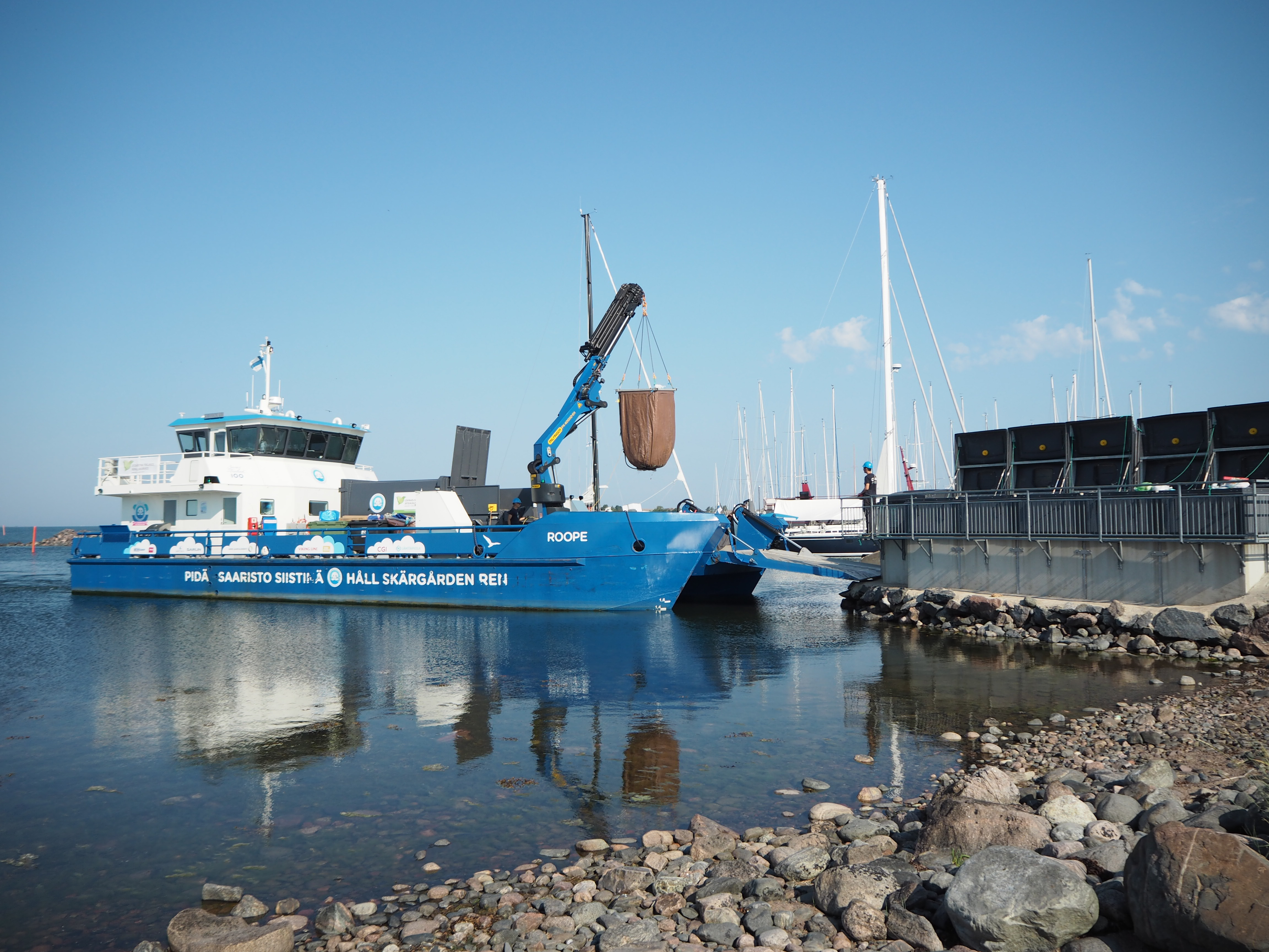 PSS ry:n Saaristomeren huoltoalus M/S Roope tyhjentämässä syväkeräimiä Jurmossa